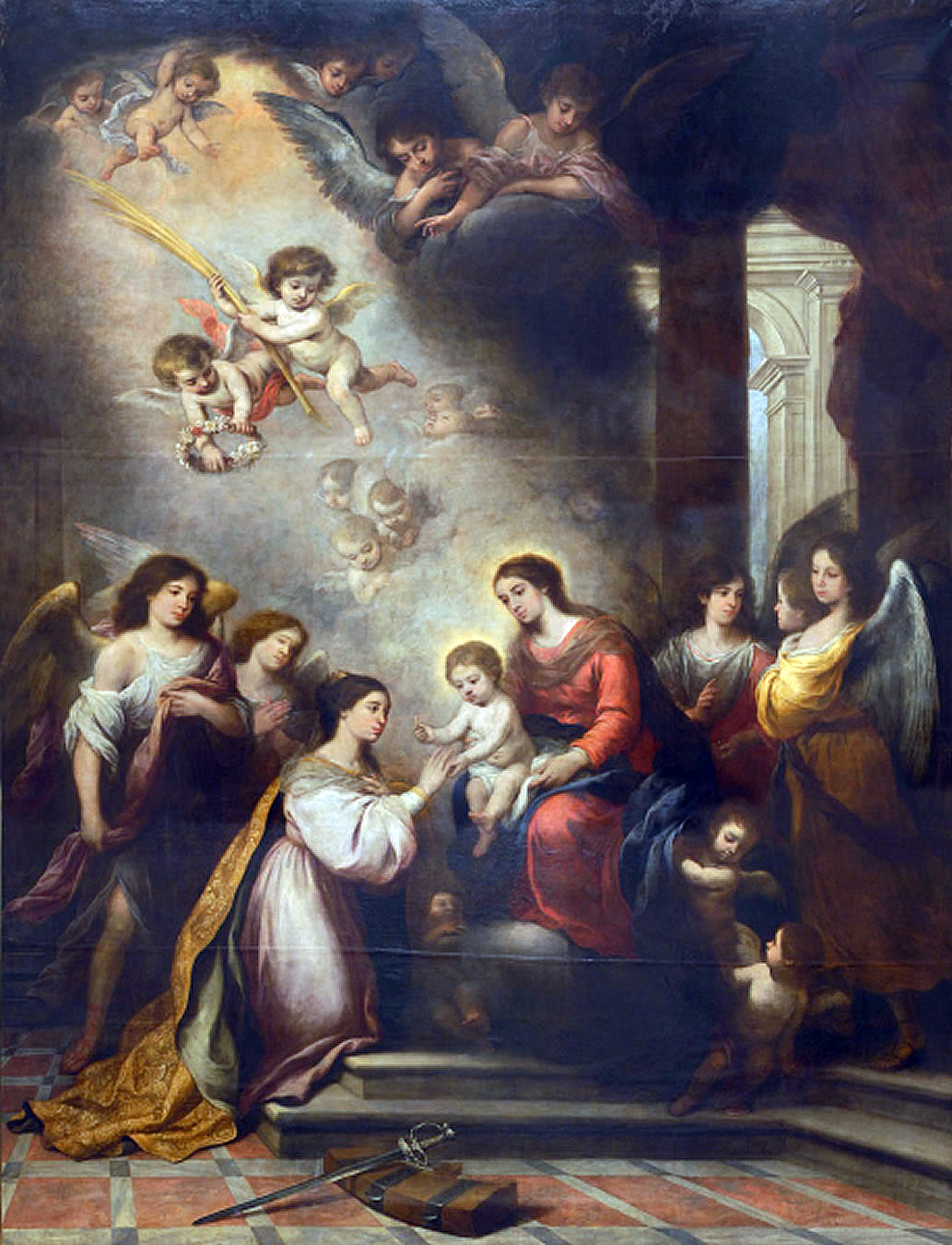 La obra representa los desposorios místicos de la virgen y mártir Santa Catalina de Alejandría con la Virgen María y el Niño Jesús.